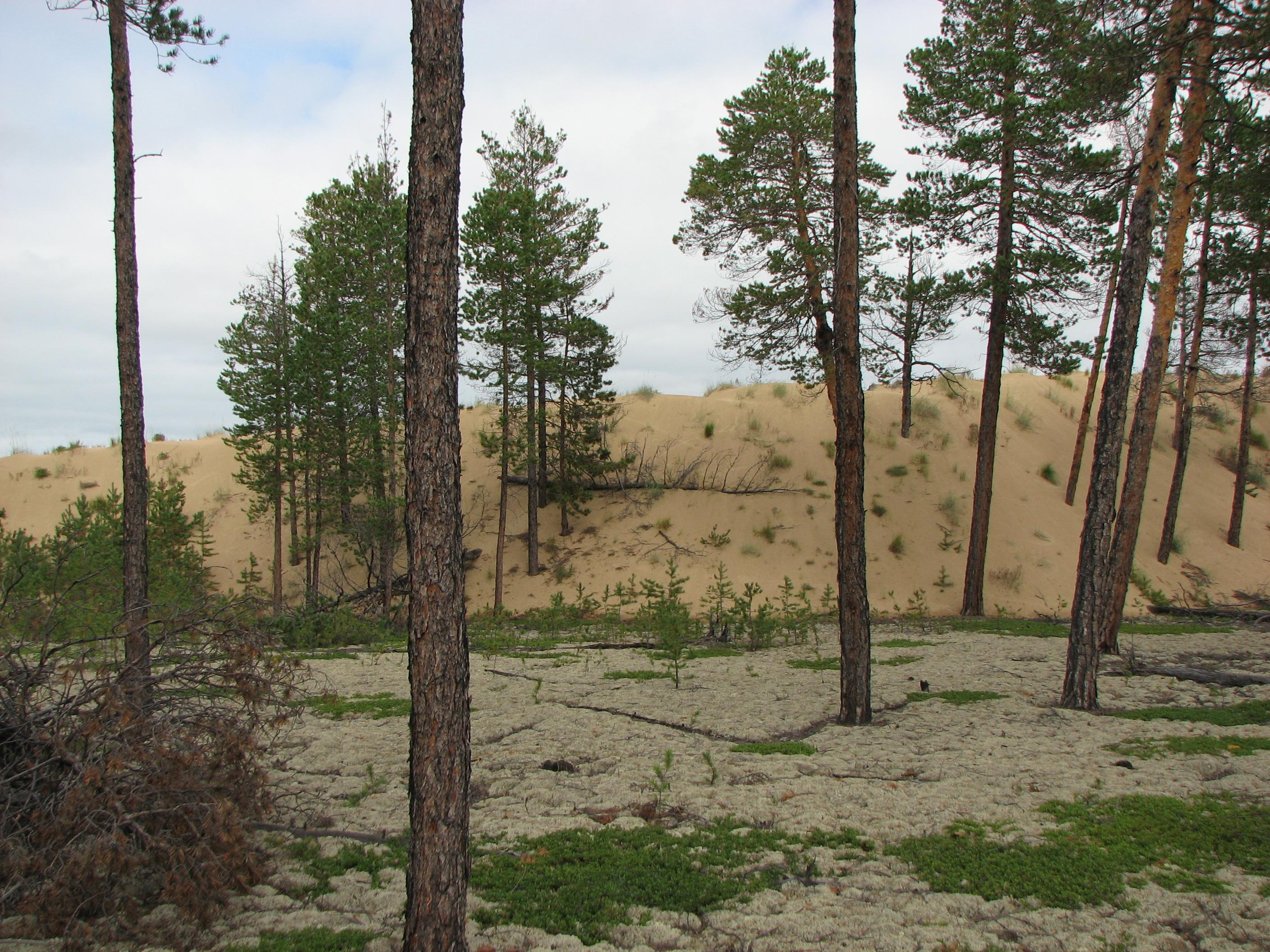 край тукуланов